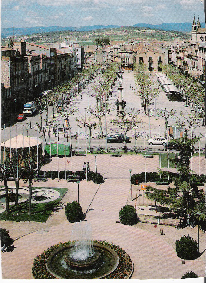 Panoràmica Rambla Sant Francesc i Plaça Penedès